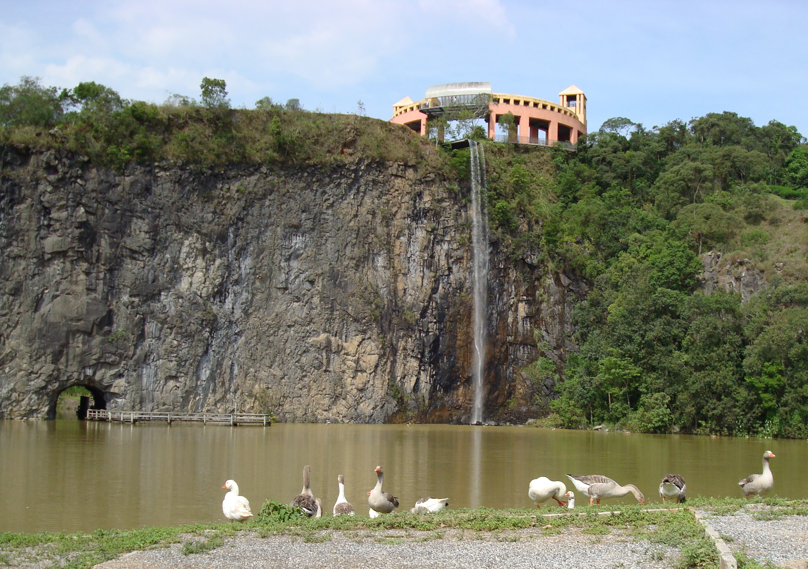 Área inferior do Parque Tanguá, Curitiba, Brasil. Na foto, a pedreira, o túnel e a cascata que sai da área superior do mesmo parque.